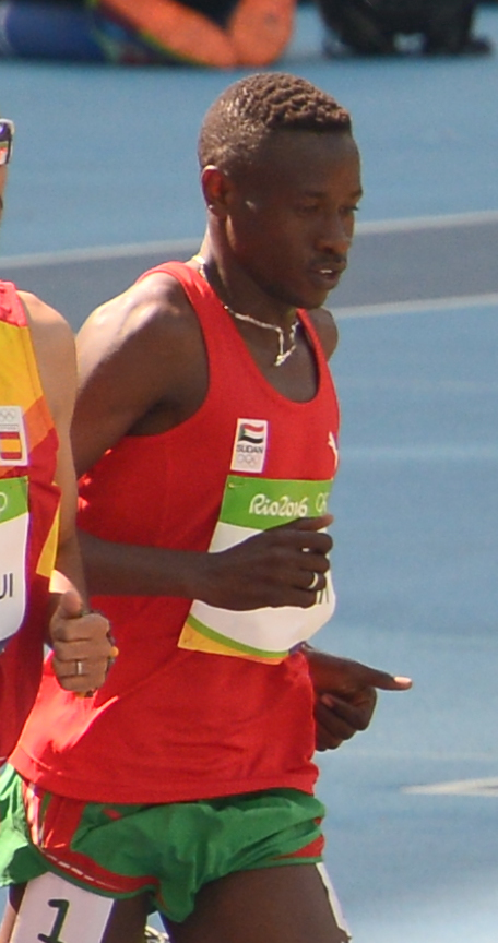 Série du 3000m steeple Homme des JO de Rio, 2016